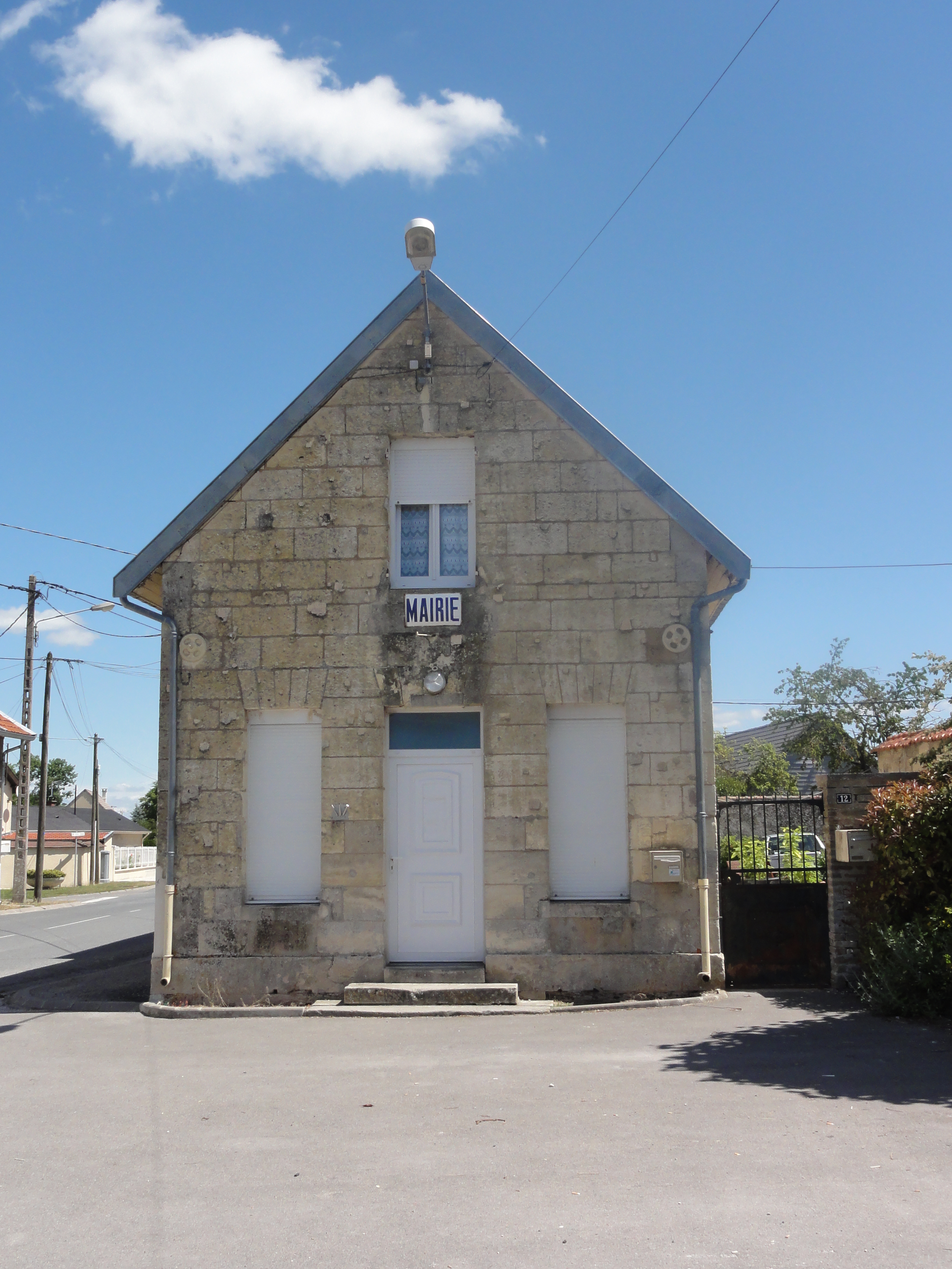 Pignicourt (Aisne) mairie